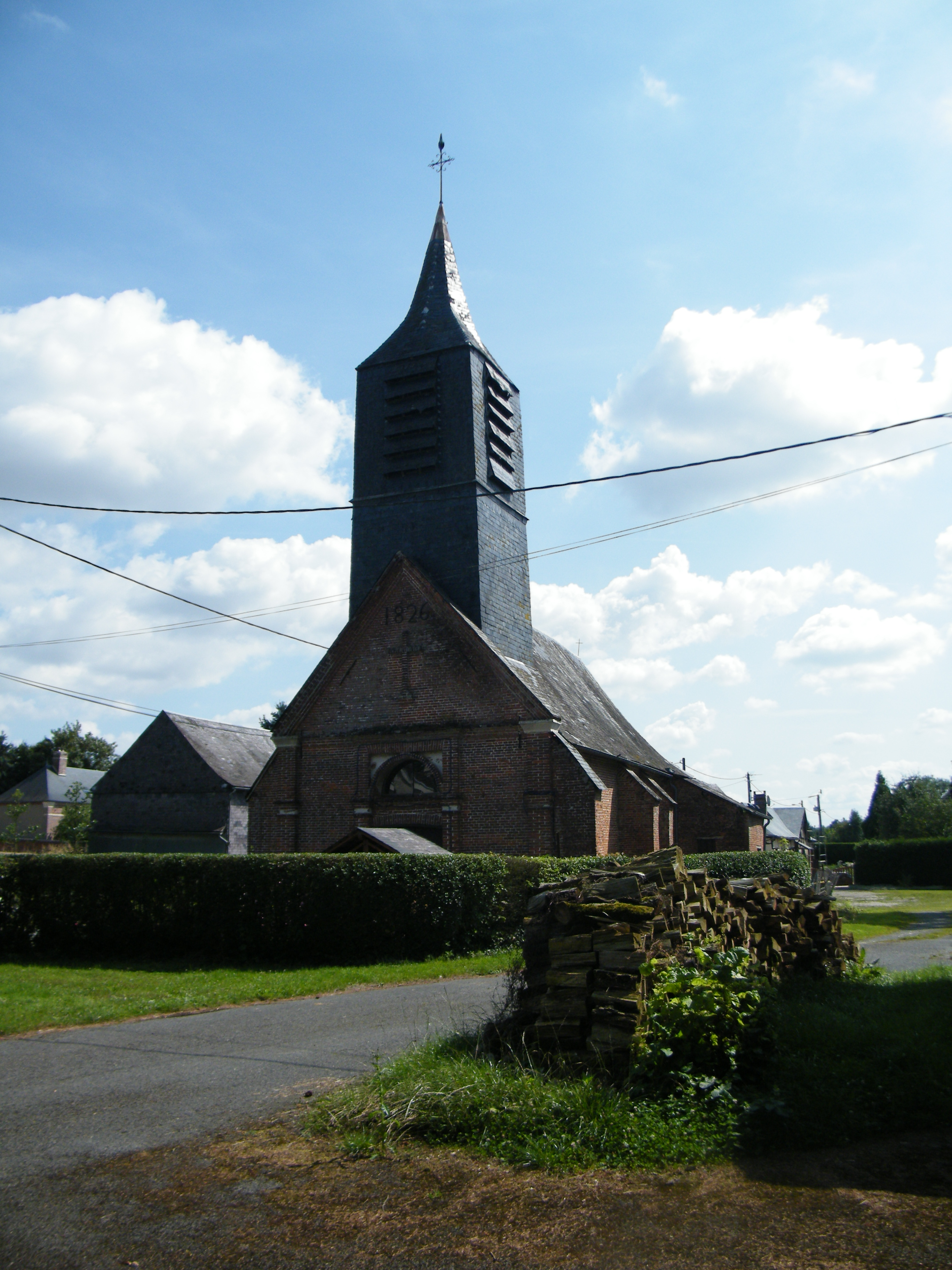 église.